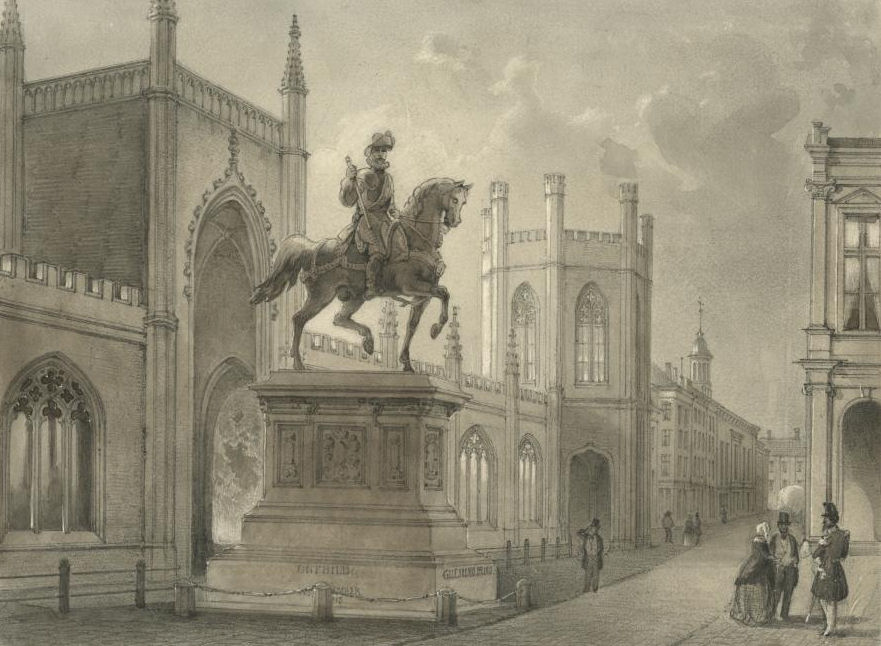 Gotische galerij in Den Haag, met ruiterstandbeeld van Willem van Oranje. In potlood weergegeven door Ludwig Rohbock.